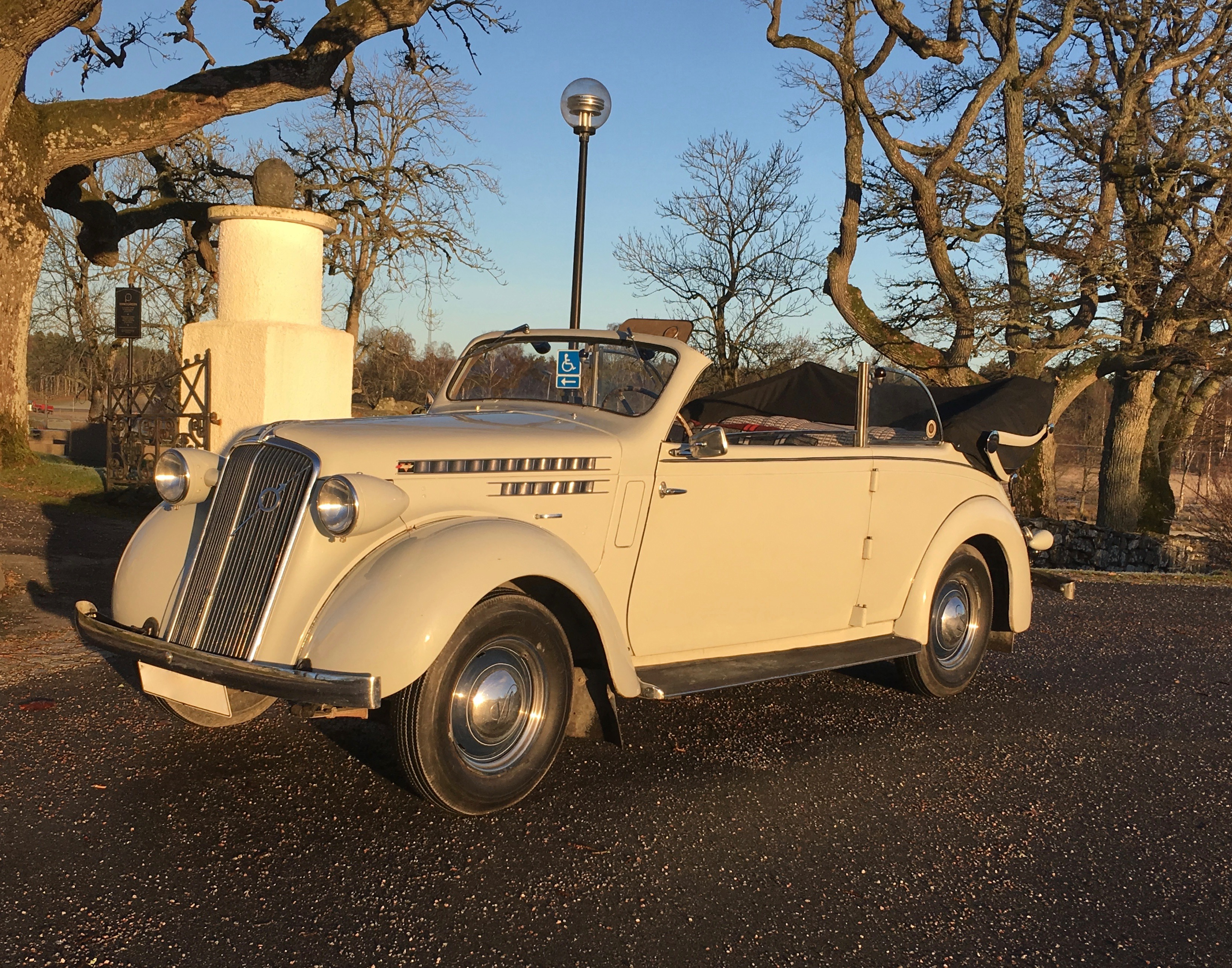 Volvo Pv51C 1937 Nordbergs Karosseri